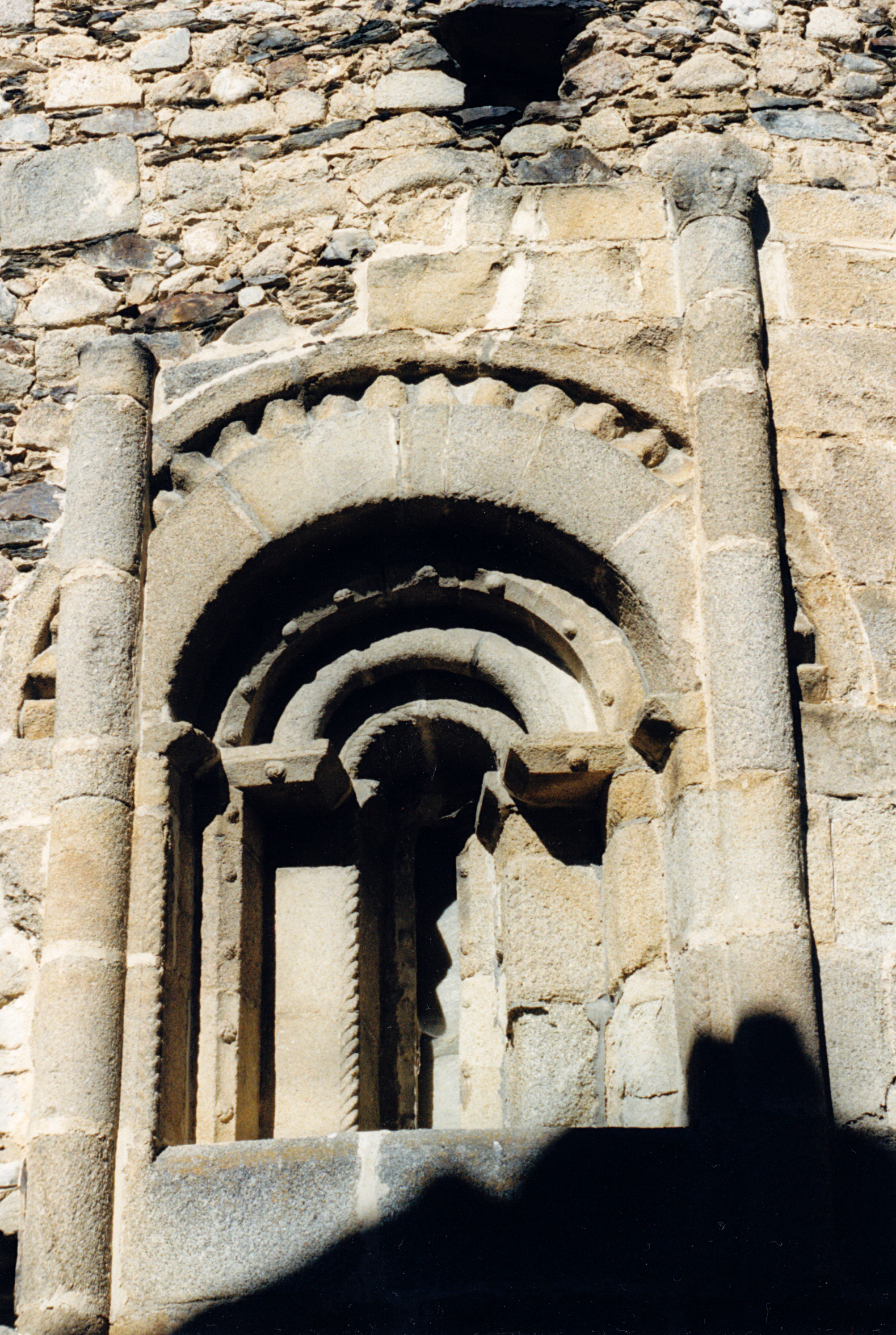 France - Cerdagne - Église Saint-Saturnin d'Enveitg